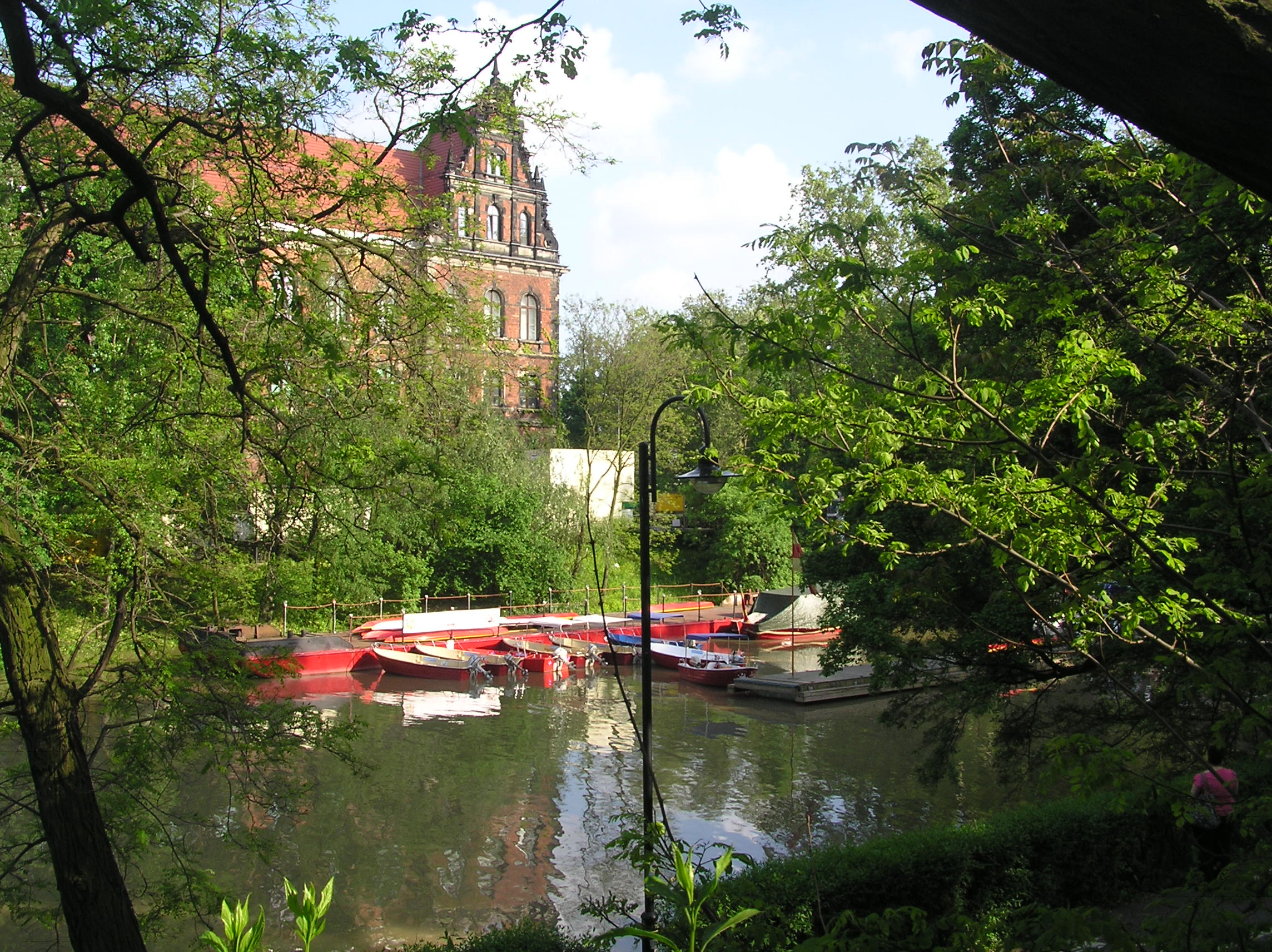 Zatoka Gondoli